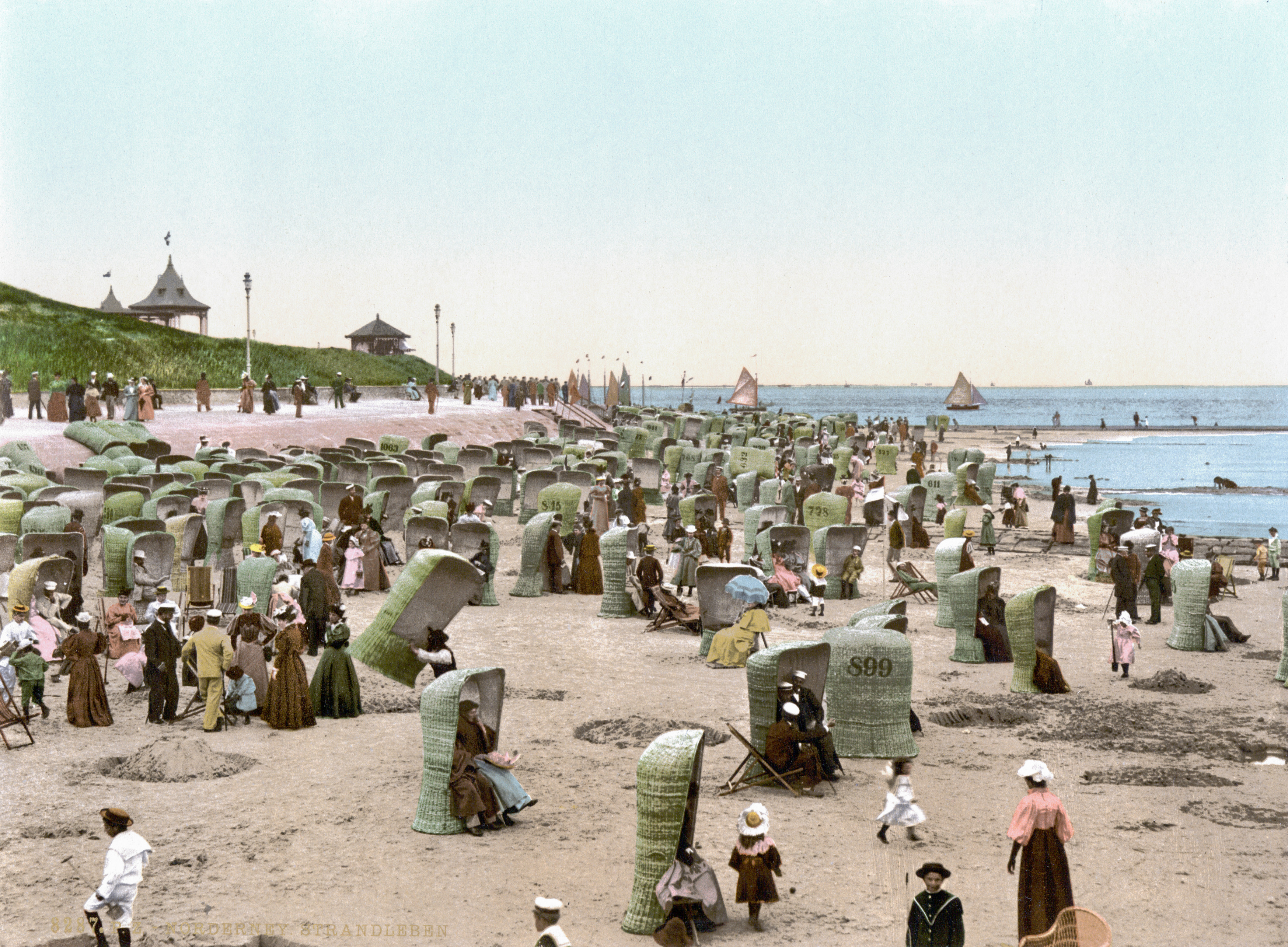 Norderney Strand um 1900